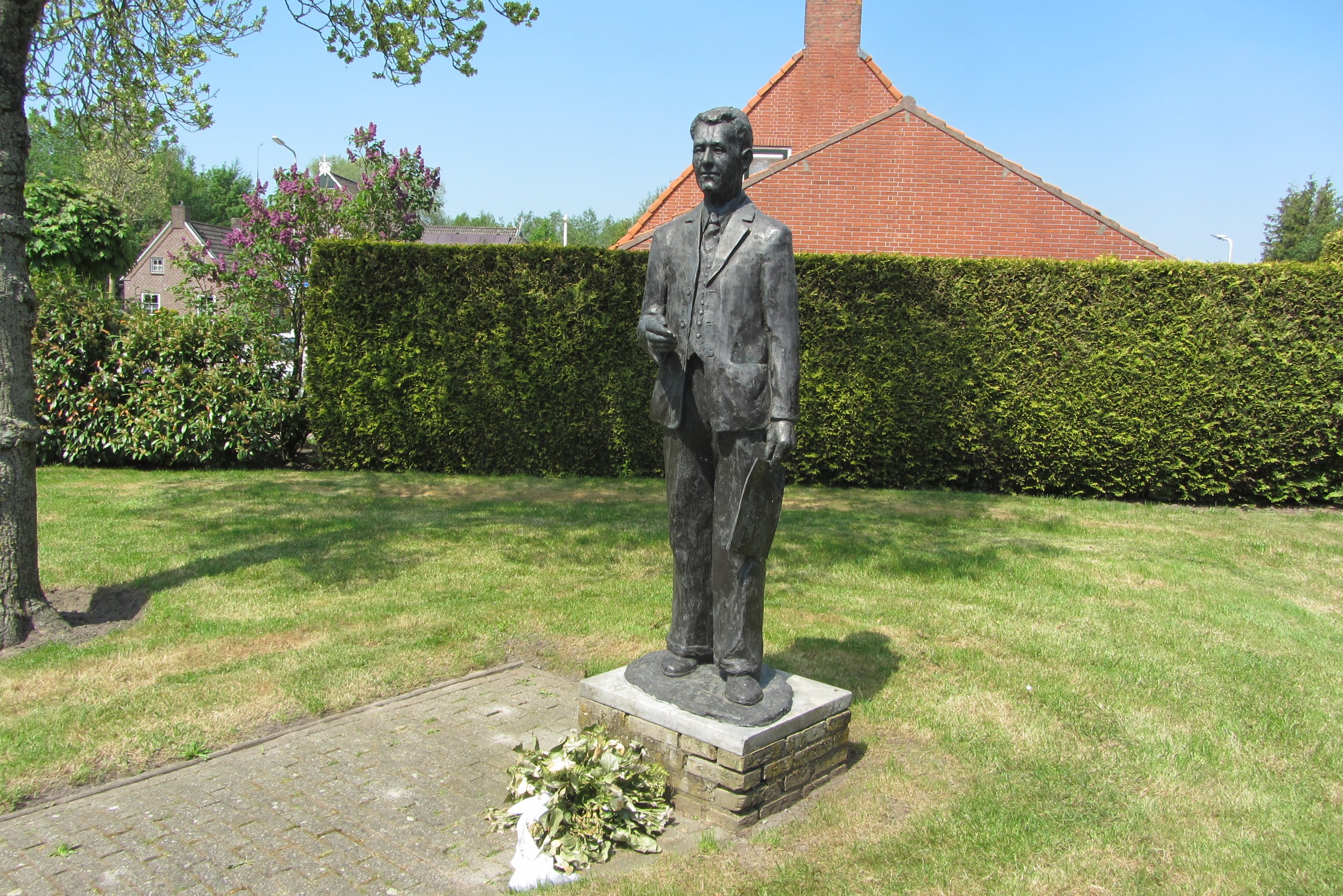 Kunstenaar: Frans Ram, 1999